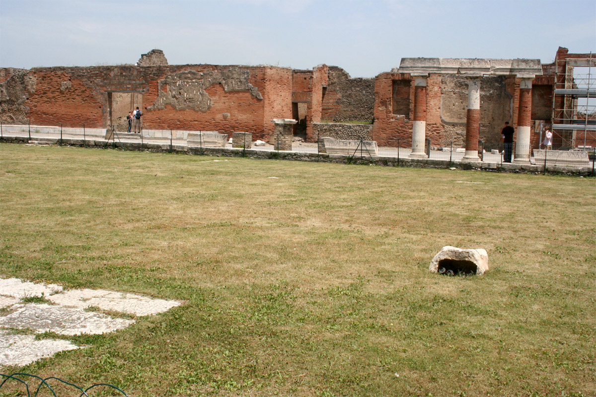 Edificio de Eumaquía en Pompeya